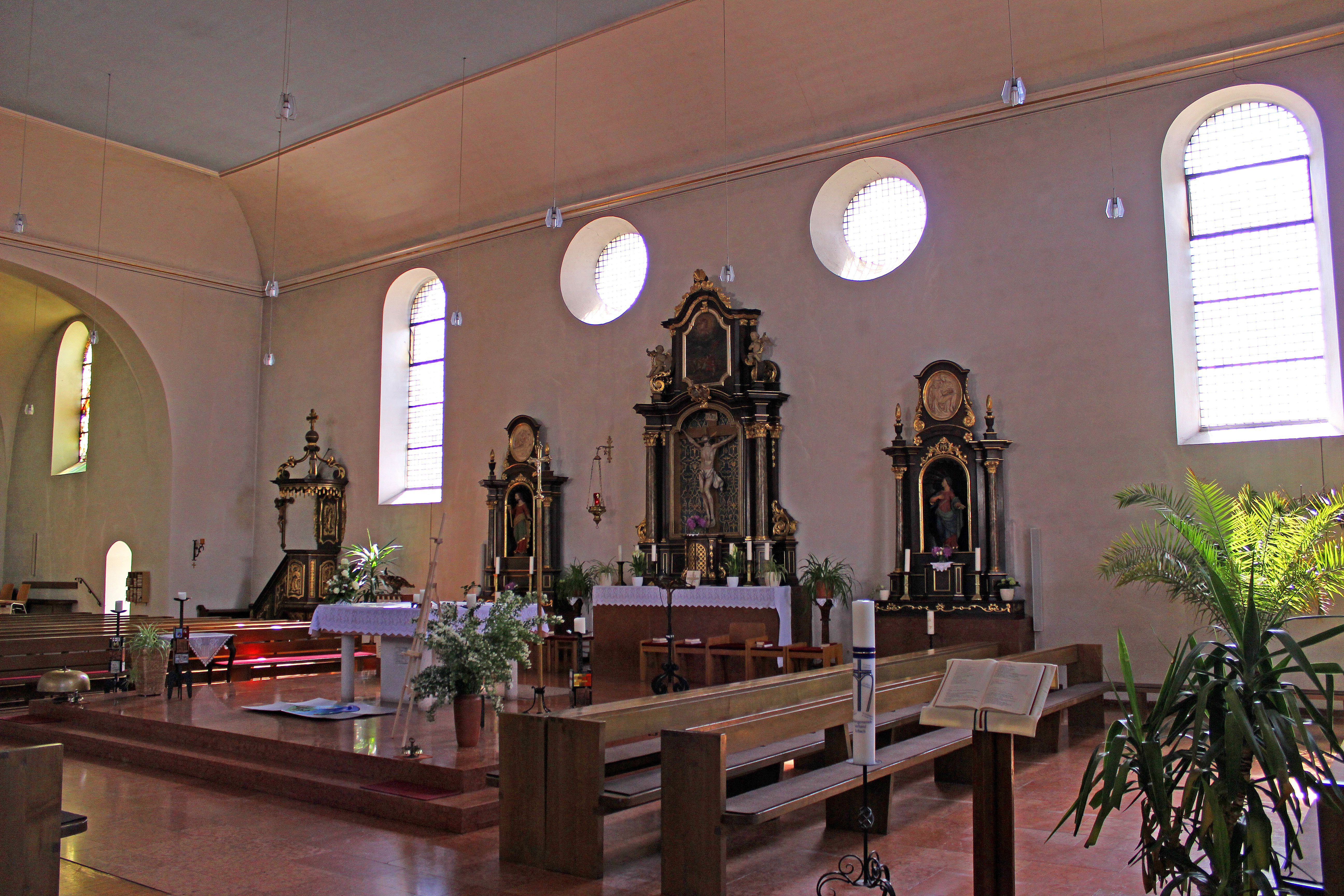 Blick ins Innere der katholischen Pfarrkirche St. Alban in Thalexweiler, einem Stadtteil von Lebach, Landkreis Saarlouis, Saarland